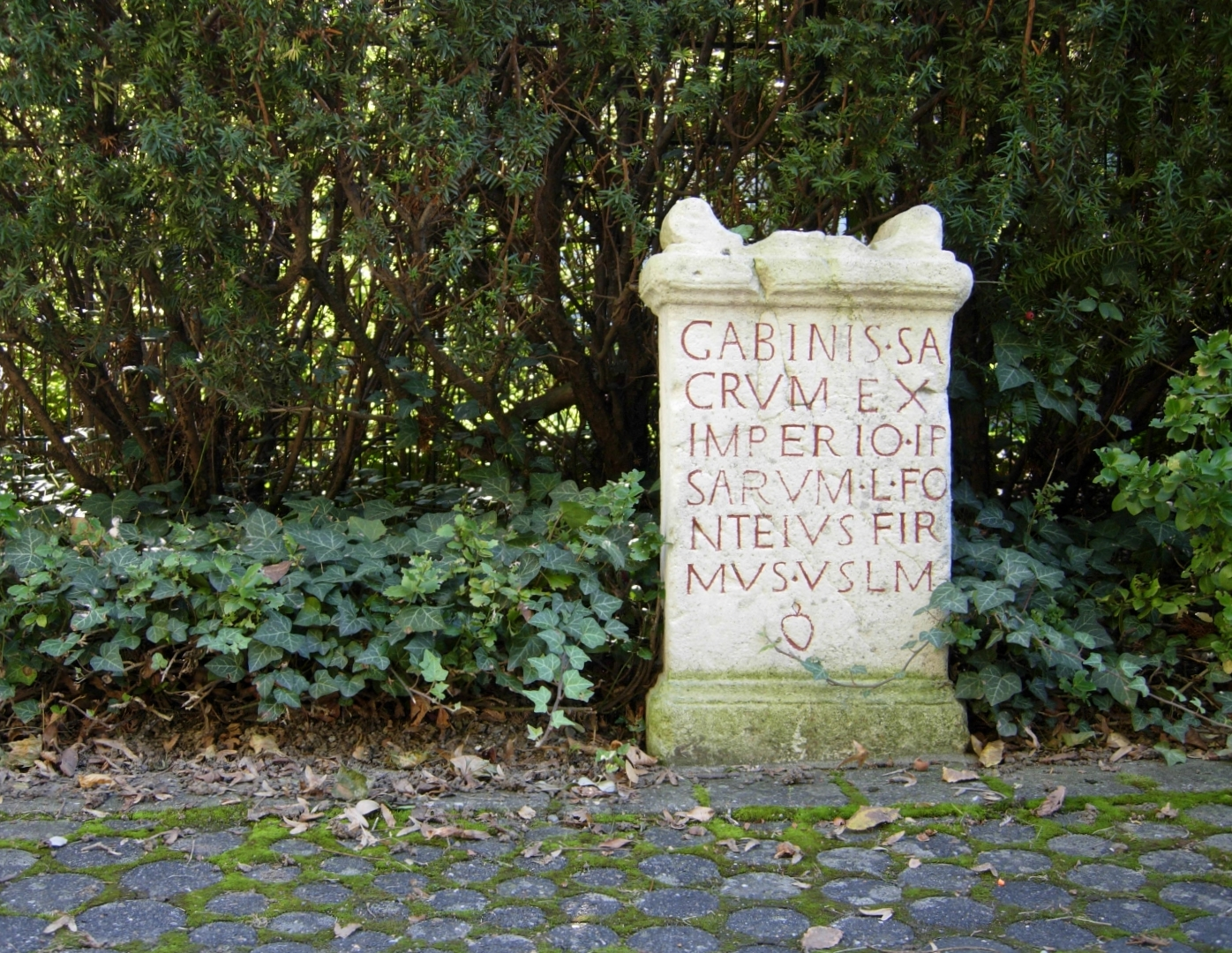 Kopie eines Matronensteins (2. Jh) nahe der Aegidiuskirche in Bonn-Buschdorf. Das Original (1964 unter der Buschdorfer Straße entdeckt) steht im Rheinischen Landesmuseum. Die Abkürzung am Ende steht für Votum Solvit Libens Merito, eine gebräuchliche Floskel auf Weihesteinen: „Das Gelübde hat [er oder sie] gern nach Verdienst erfüllt.“ Text (IRheinland-01, 00007 = AE 1981, 678): Gabin[i]s sa crum ex im[p]erio ip sar[u]m L(ucius) Fo nte[ius] Fir mus v(otum) [s(olvit) l(ibens) m(erito) Übersetzung: „Den Gabinischen Matronen gewidmet auf deren Geheiß, L. Fonteius Firmus hat [sein] Gelübde gern nach Verdienst erfüllt.“